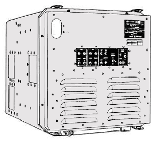 Миникомпьютер UYK-20